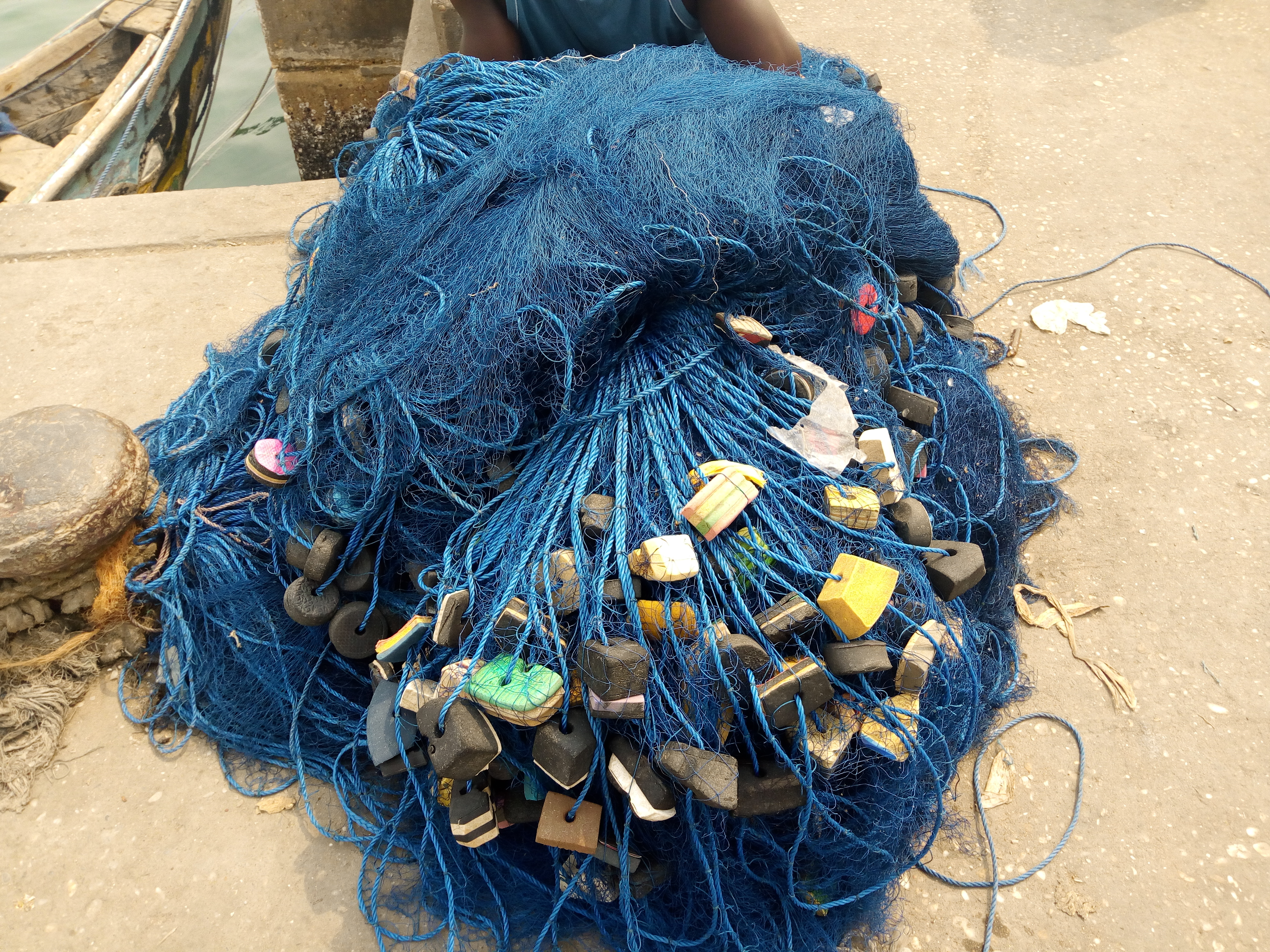 Filets flottants de pêche au port de pêche de Cotonou au Bénin This is an image with the theme "Africa on the Move or Transport" from: Benin